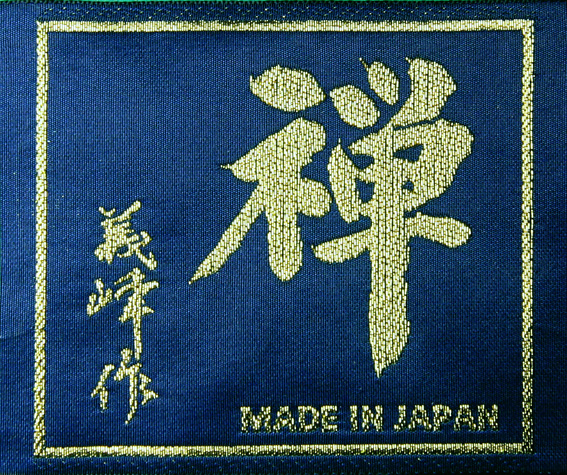 禅タグ - 株式会社三恵